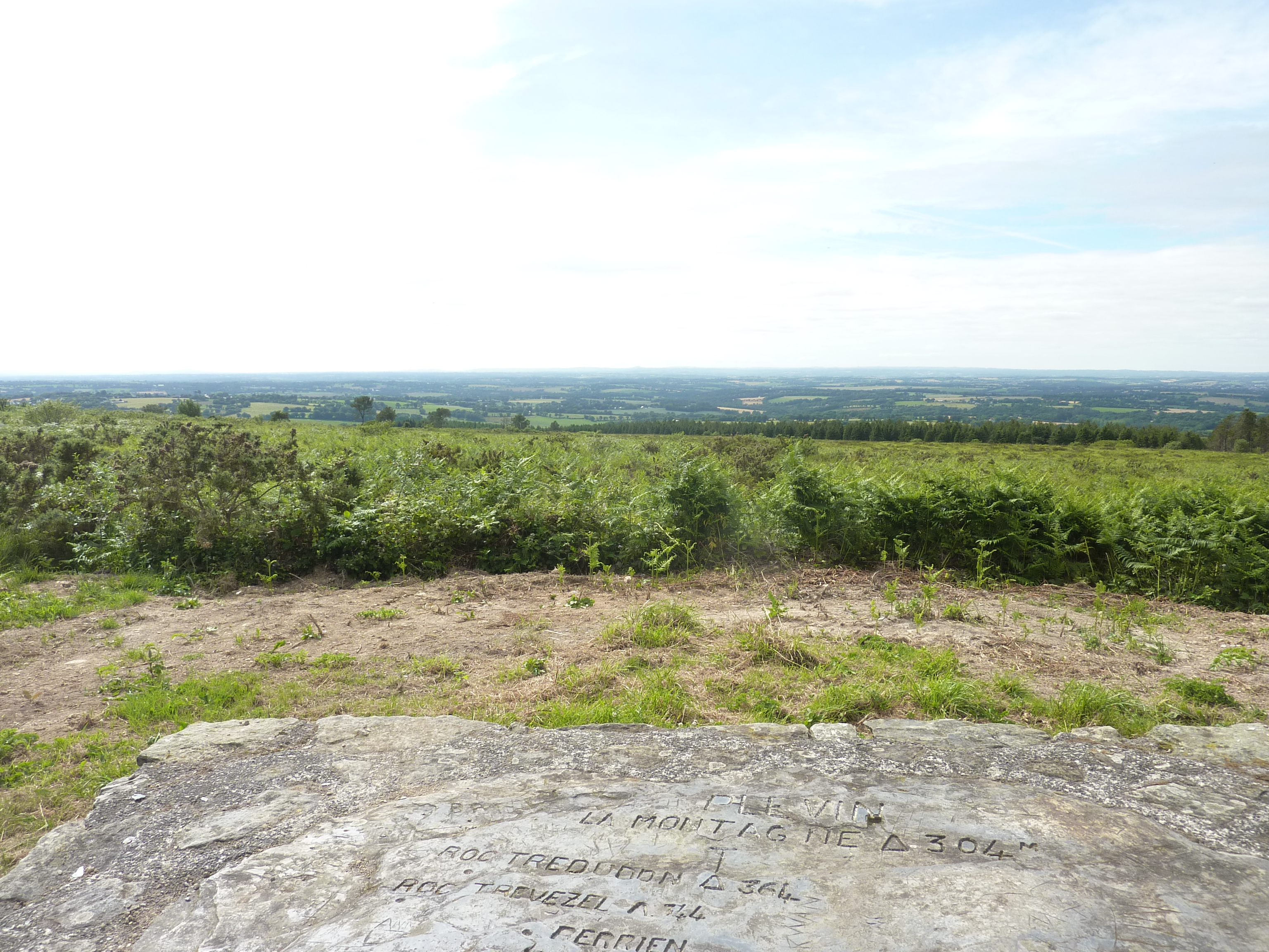 Vue vers le nord en direction des Monts d'Arrée à partir du sommet du Ménez Gliguéric, un des sommets des Montagnes Noires, situé à 304 m d'altitude, en Plévin.